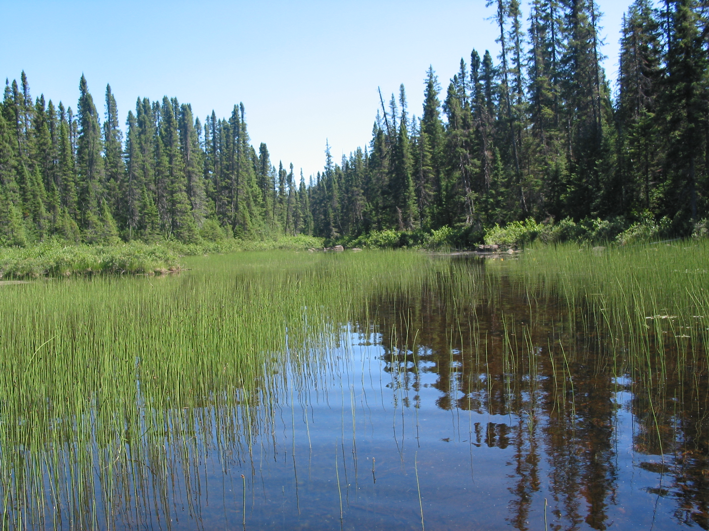 La culotte, parc national des monts-valin, au Québec